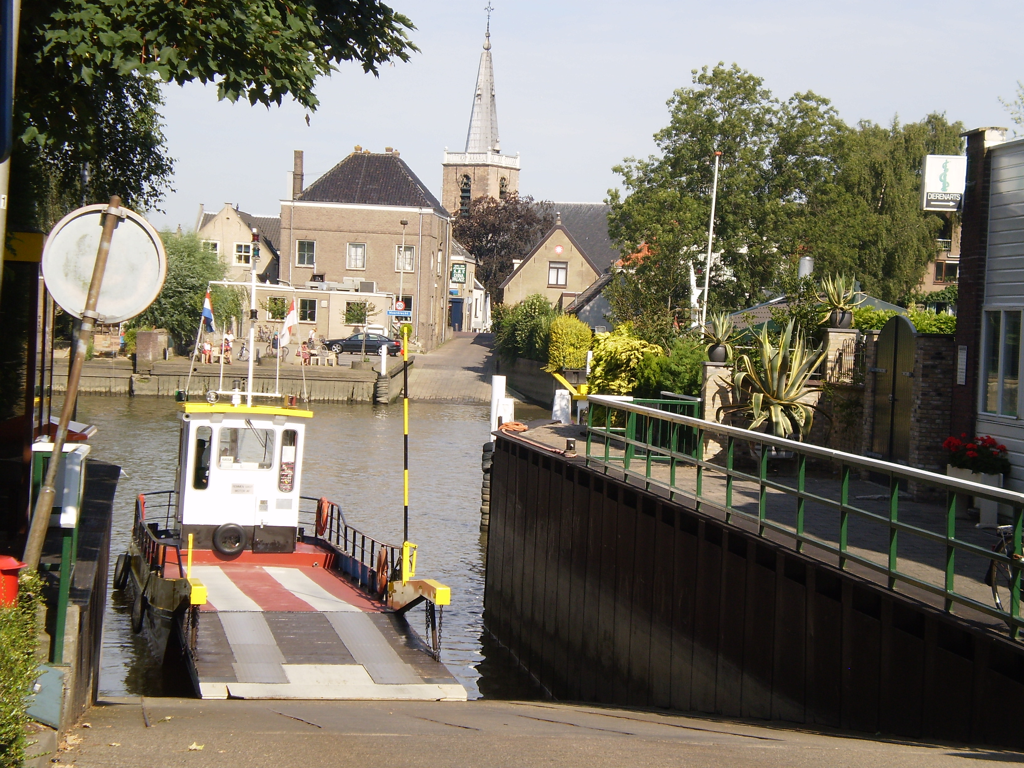 Gouderak pontsje nei Moordrecht oan de oare kant fan de Hollânske Isel.